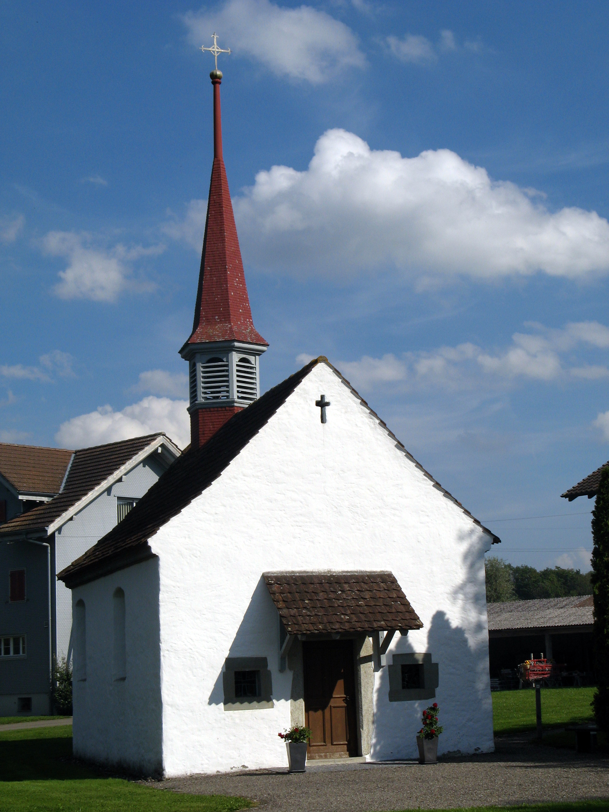 Wendelinskapelle in Hagnau bei Merenschwand, Aussenansicht